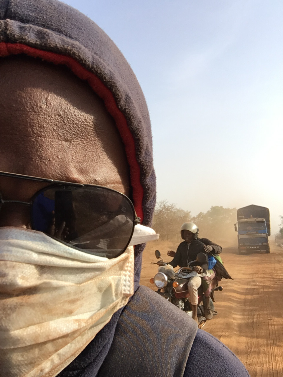 Motocycliste devant un camion This is an image with the theme "Africa on the Move or Transport" from: Benin